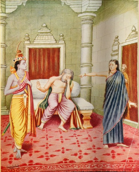 Chitra Ramayana (Illustrated Ramayana) is a simplified story of the great Indian epic in Kannada. The type is bold and beautiful. The thick pages have become brittle and need careful handling. Printed by B. Miller, Superintendent, British India, Press, Mazgaon, Bombay. It was published by, Shrimat Balasaheb Pandit Pant Pratinidhi, chief of Aundh, at Aundh, Satara district. The Kannada version is by Ramachandra Madhwa Mahishi The date shown is 1916. It is all the more important because the book contains illustrations painted by the publisher also called Bhavan Rao Shrinivas Rao, the ruler of the state of Aundh himself.